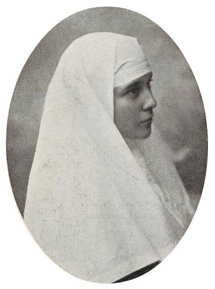 Баронесса Зоя (Стелла) Романовна Мейендорф (урожденная Вишау), жена Павла Феофиловича Мейендорфа